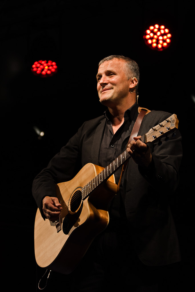 Max Paiella